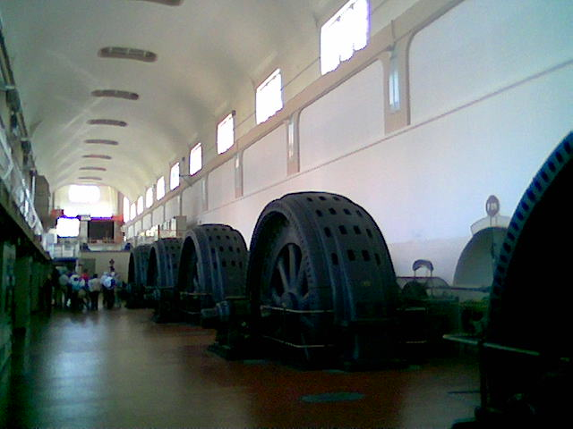 Wasserkraftwerk Wyhlen Maschinenhalle